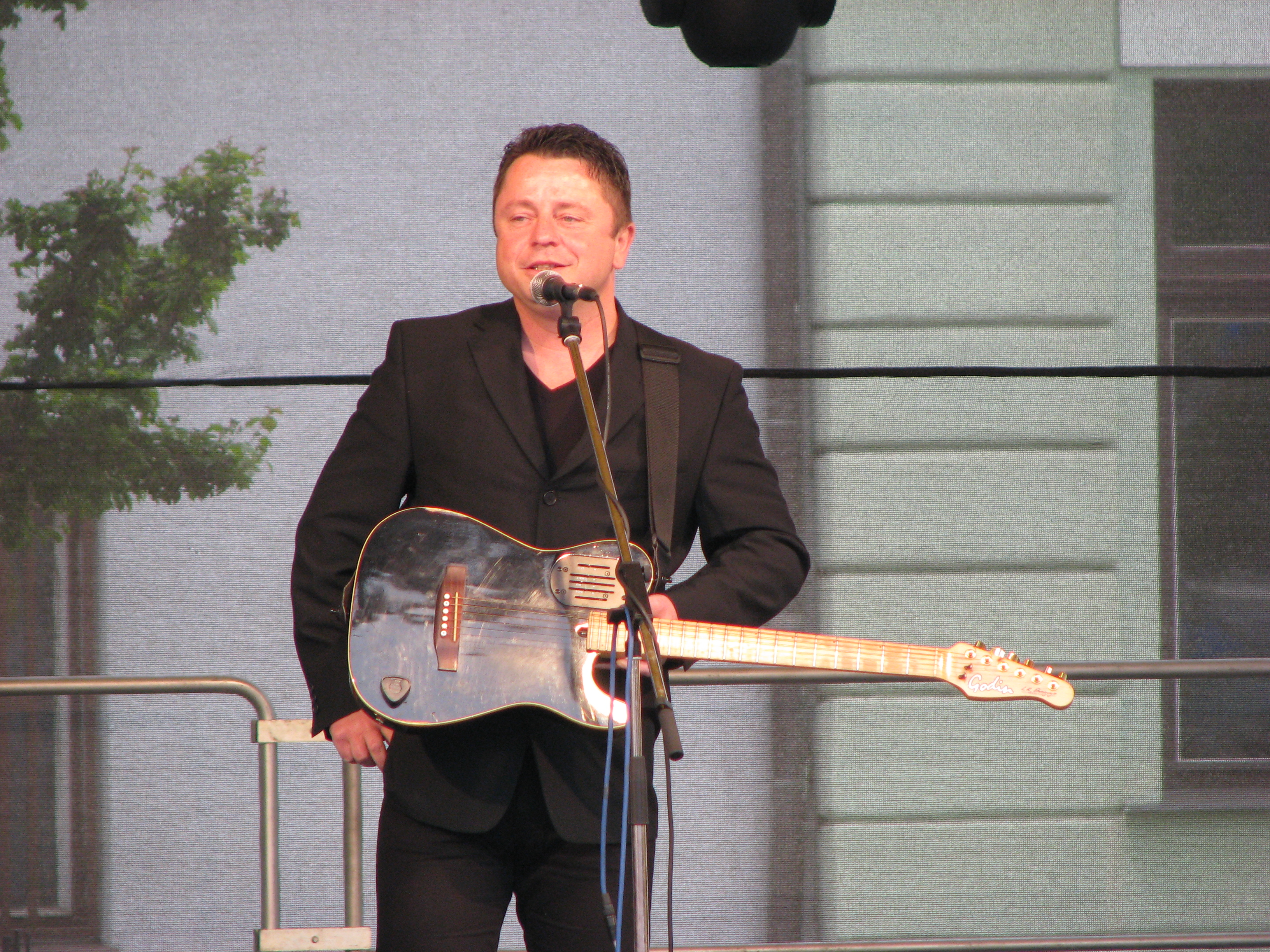 Petr Muk na koncertě v Přerově